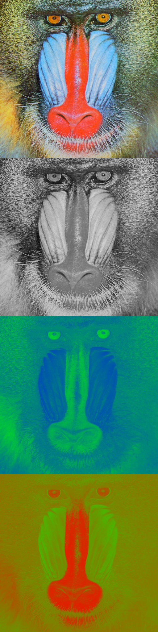 YUV colorspace